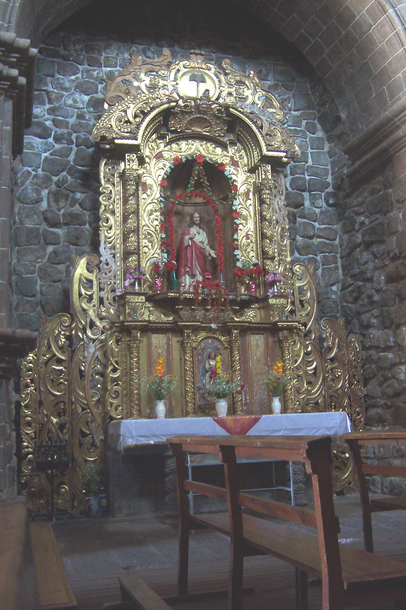 Juli, capital de la provincia de Chucuito. Vista interior de la catedral. Altar lateral en madera recubierto de pan de oro. Autor: Alfredobi Fecha: Agosto 2006